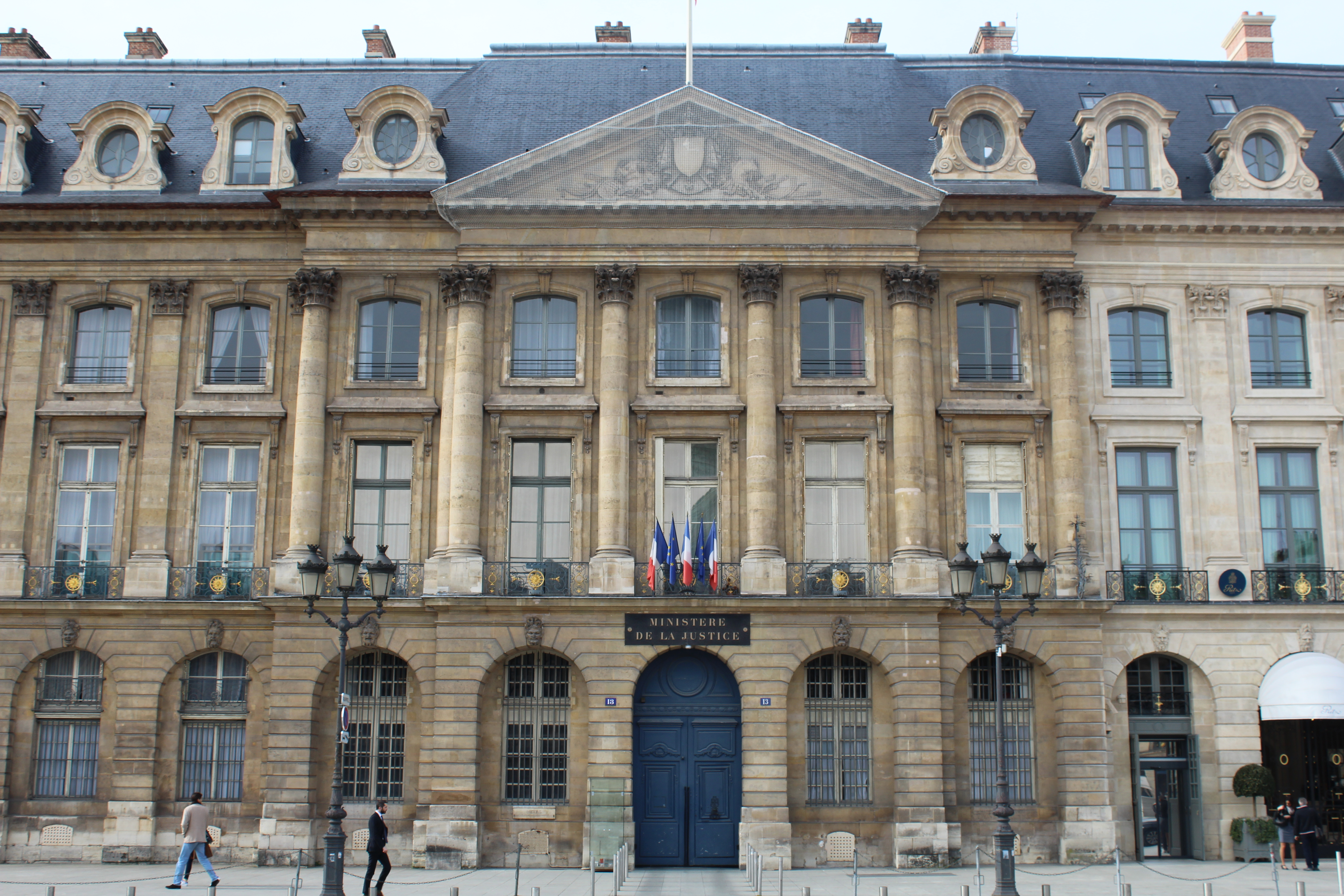 Hôtel de Bourvallais à Paris.